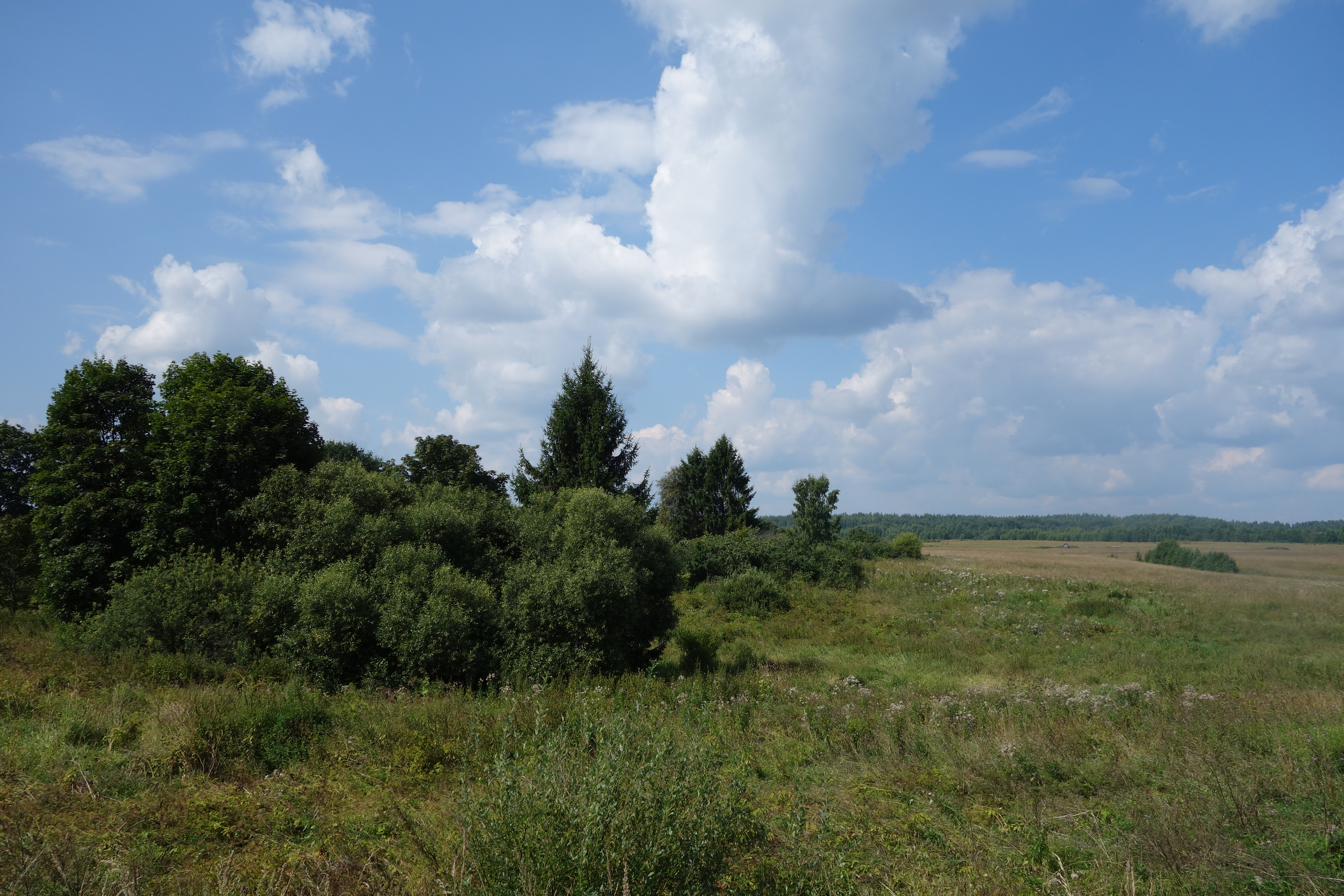 Леса, поля и облака